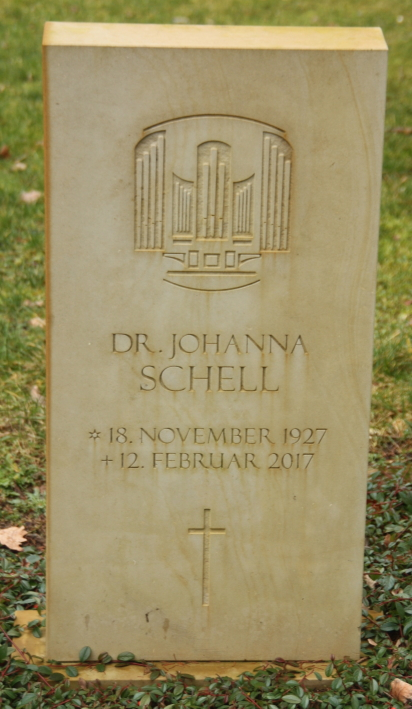 Grabstein der Kirchenmusikerin Johanna Schell, Neuer Friedhof Potsdam, 2020